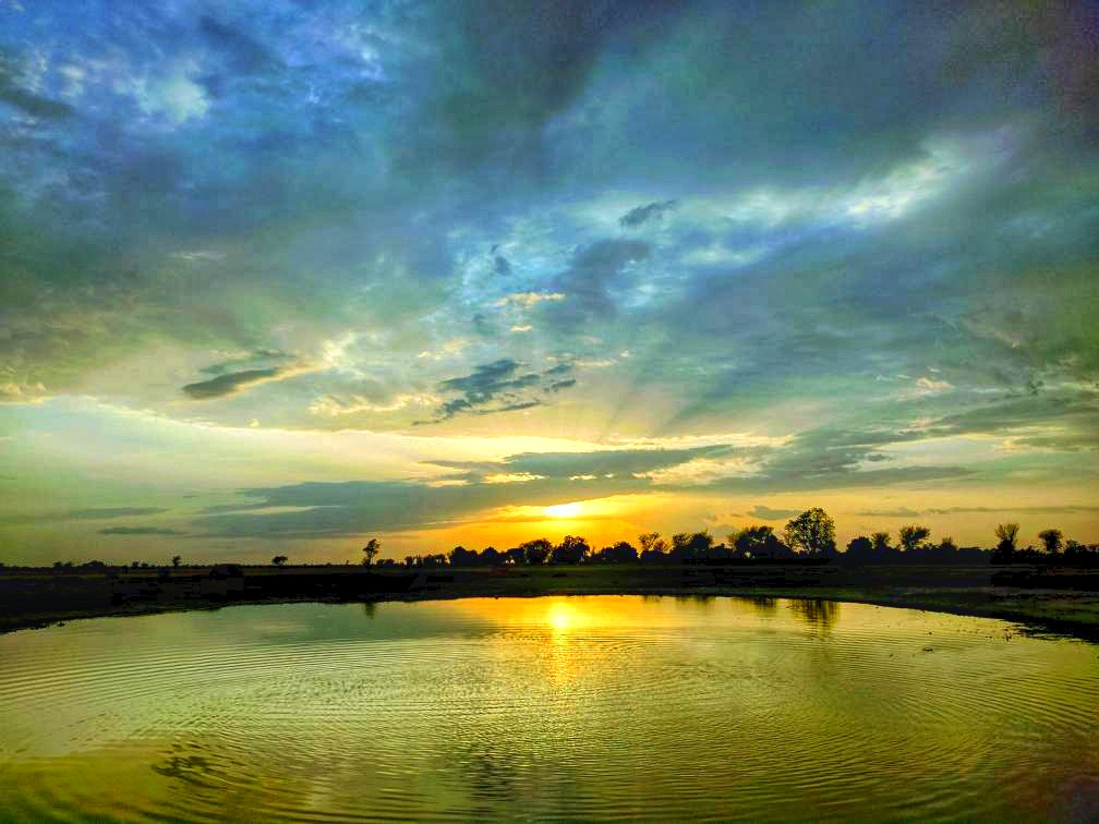 Le couché du soleil a kalfou département de mayo.